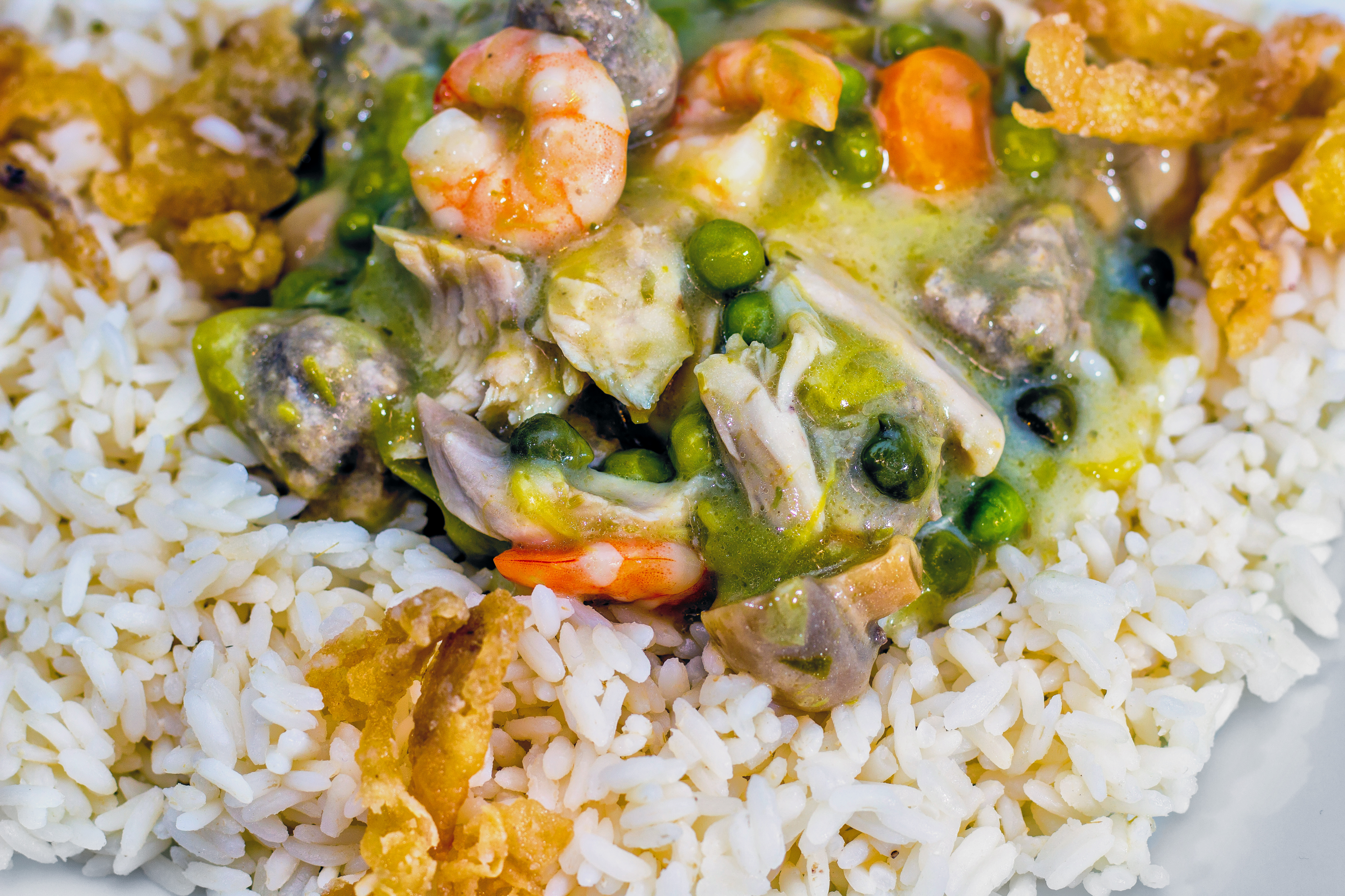 Berliner Frikassee aus Hühnerfleisch, Gemüse und Krebsschwänzen